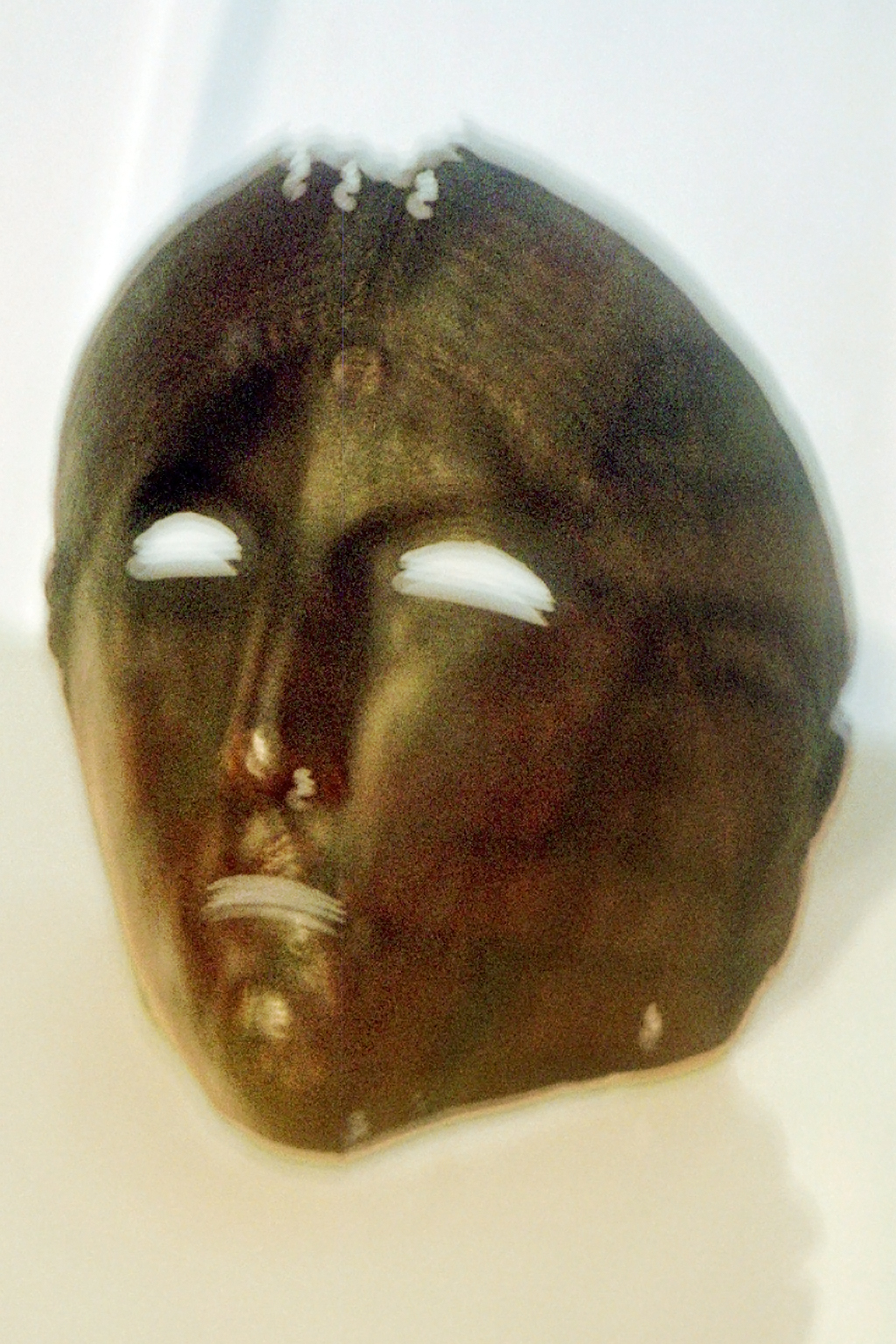 Visegrád-Várkert - Burgus Solva 26 (Ungarn): Römische Helmmaske. Aufgenommen während der provinzialrömischen Sonderausstellung „Visegrád évszázadai – A római kor kezdete a Dunakanyarban“ die vom 19.08.2011 bis 20.07.2012 im Mátyás Király Múzeum (König-Matthias-Museum), Visegrád, stattfand.